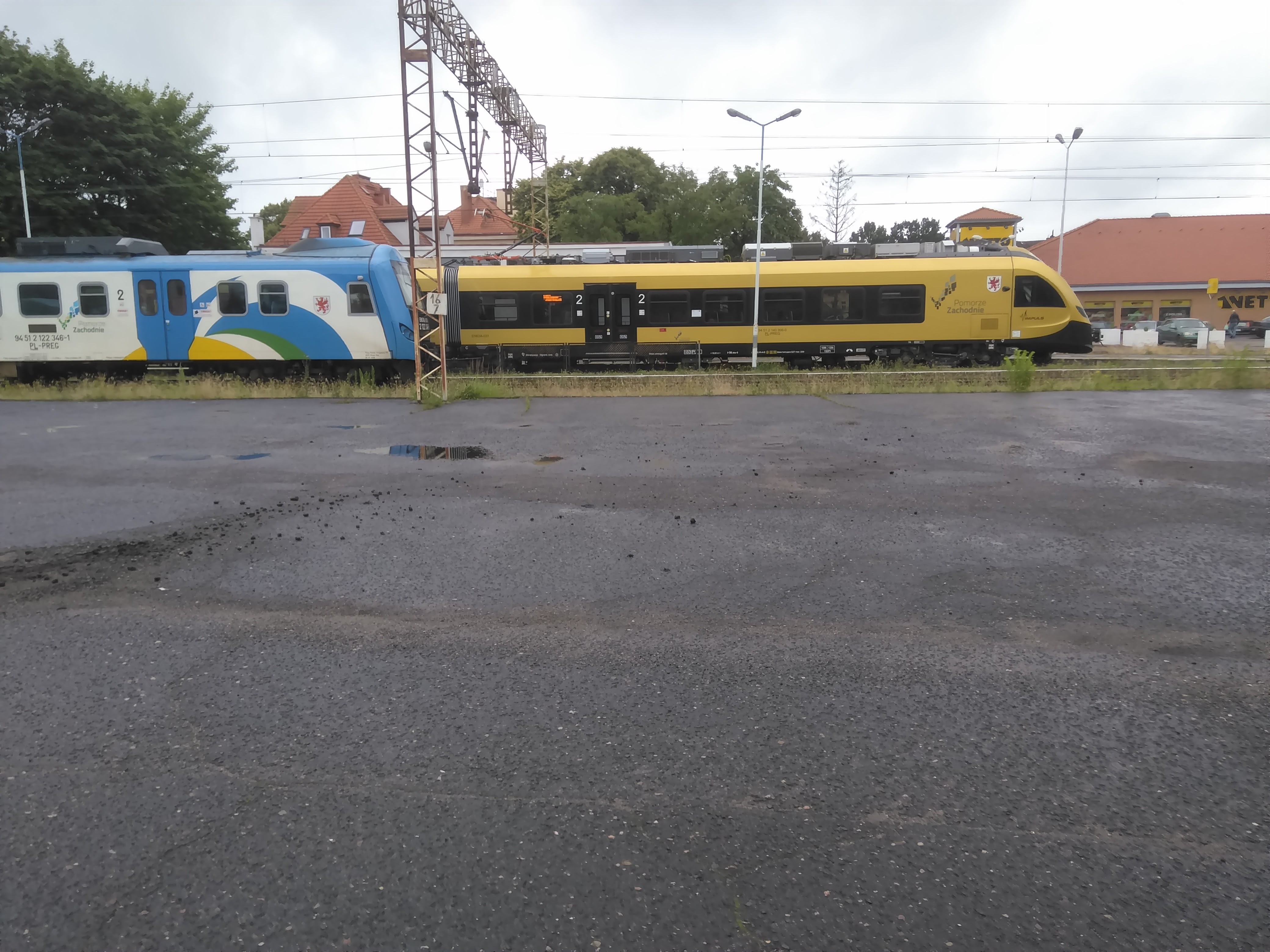 Pociągi na stacji Kamień Pomorski.